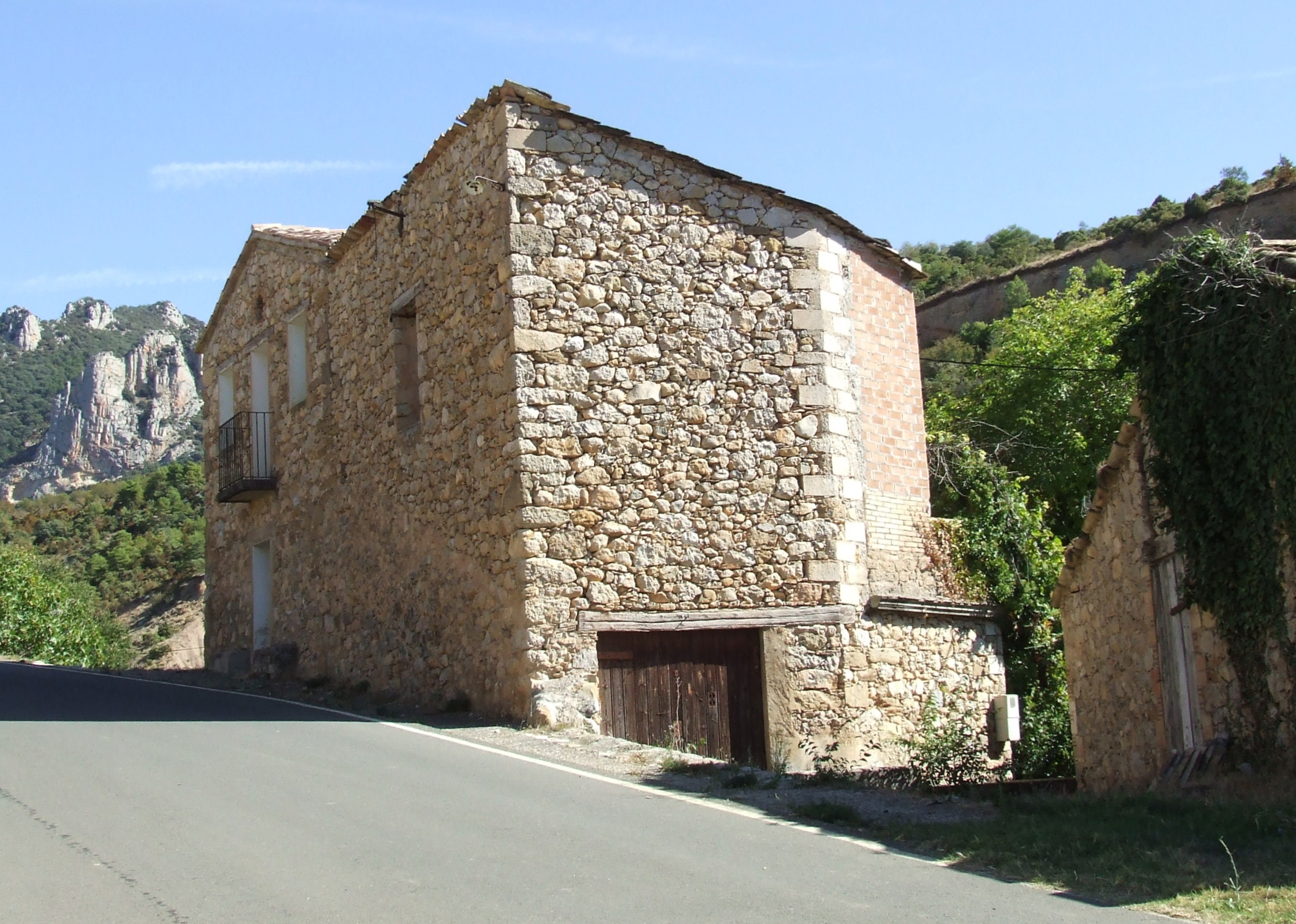 Casa Manuel (Abella de la Conca, Pallars Jussà)